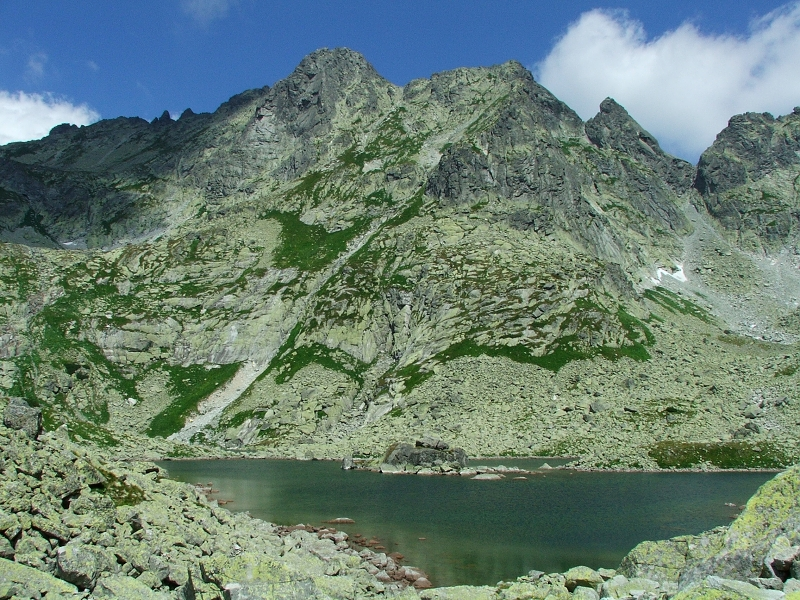 Veľké Žabie pleso Mengusovské. Sprava Žabí kôň, Žabia veža a Volia veža, dolu Veľké Žabie pleso Mengusovské.